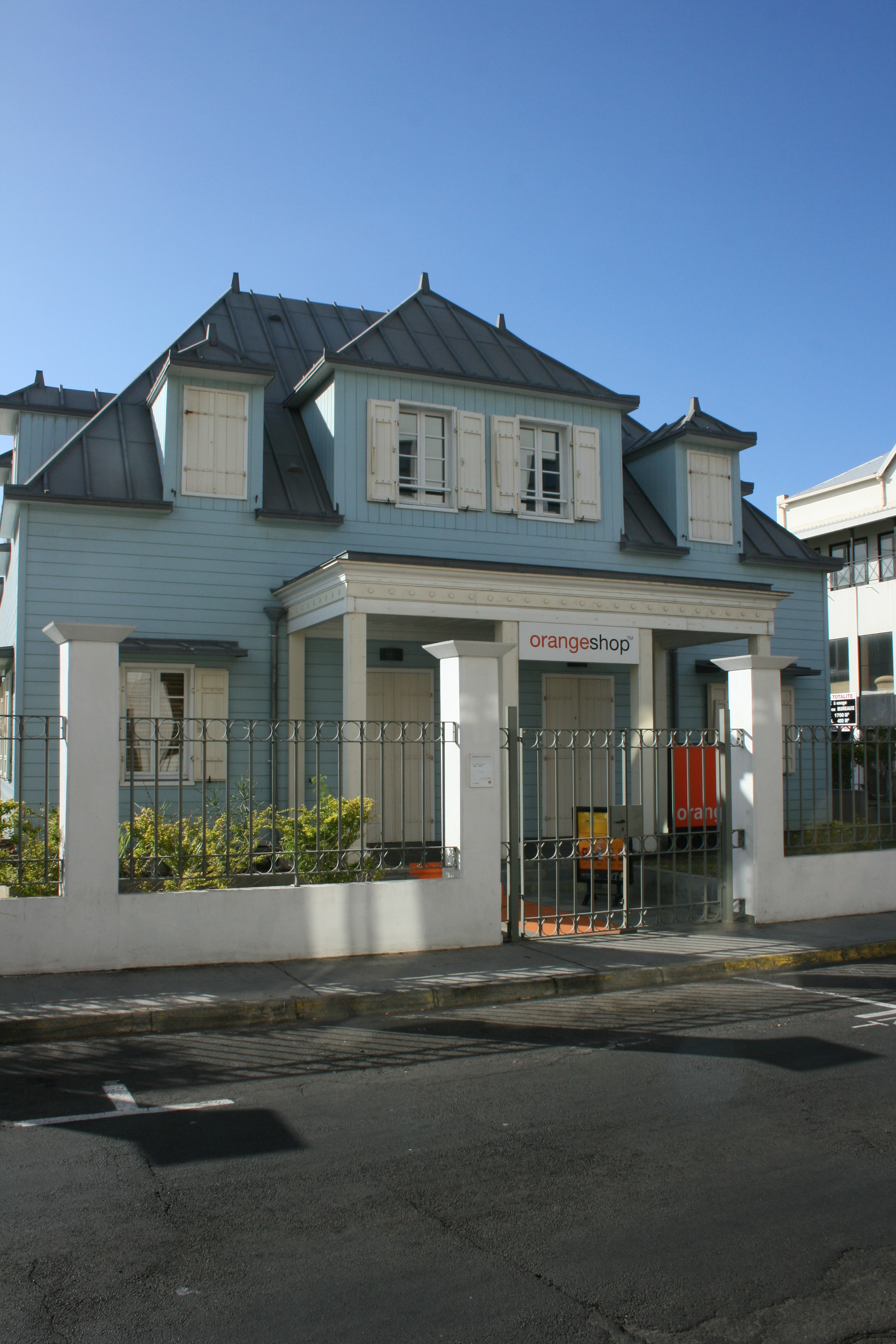 Orange Shop à Saint-Denis de la Réunion